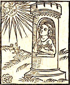 Миниатюра из кники монаха-доминиканца Франциска де Retza